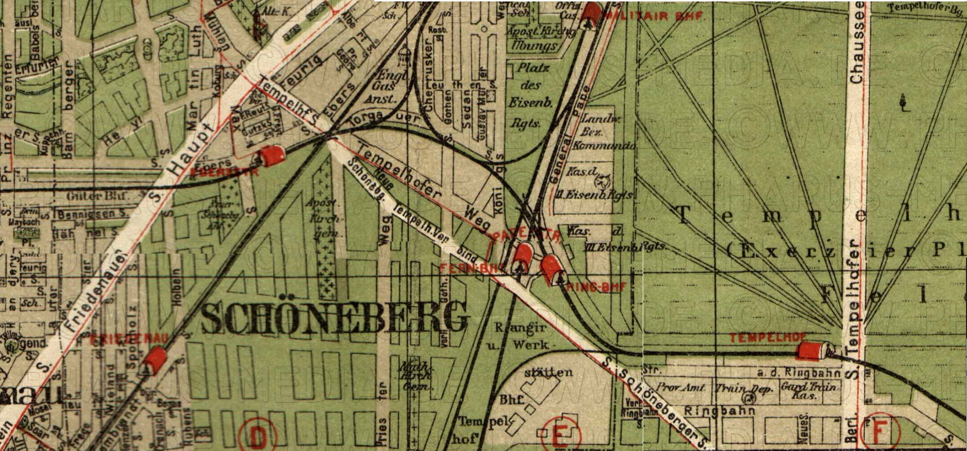 标注有柏林帕珀大街车站方位的地图